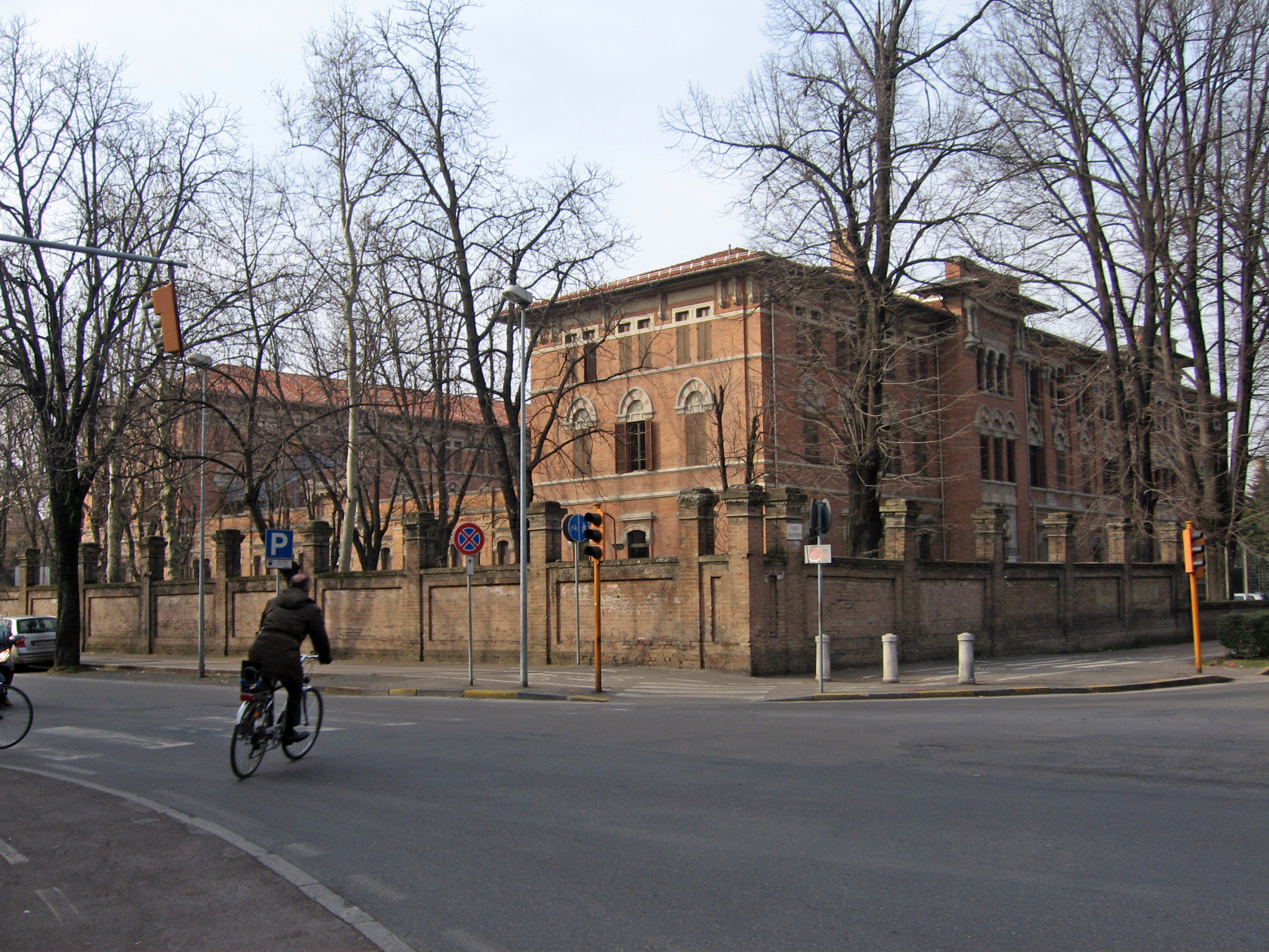 Seminario Minore (Parma)